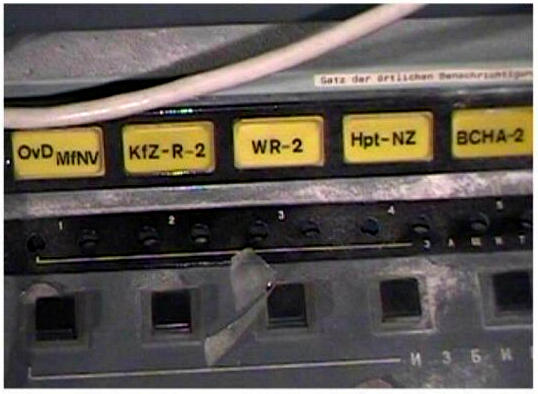 Satz der örtlichen Benachrichtigung des Alarmierungssystems "Schnur"